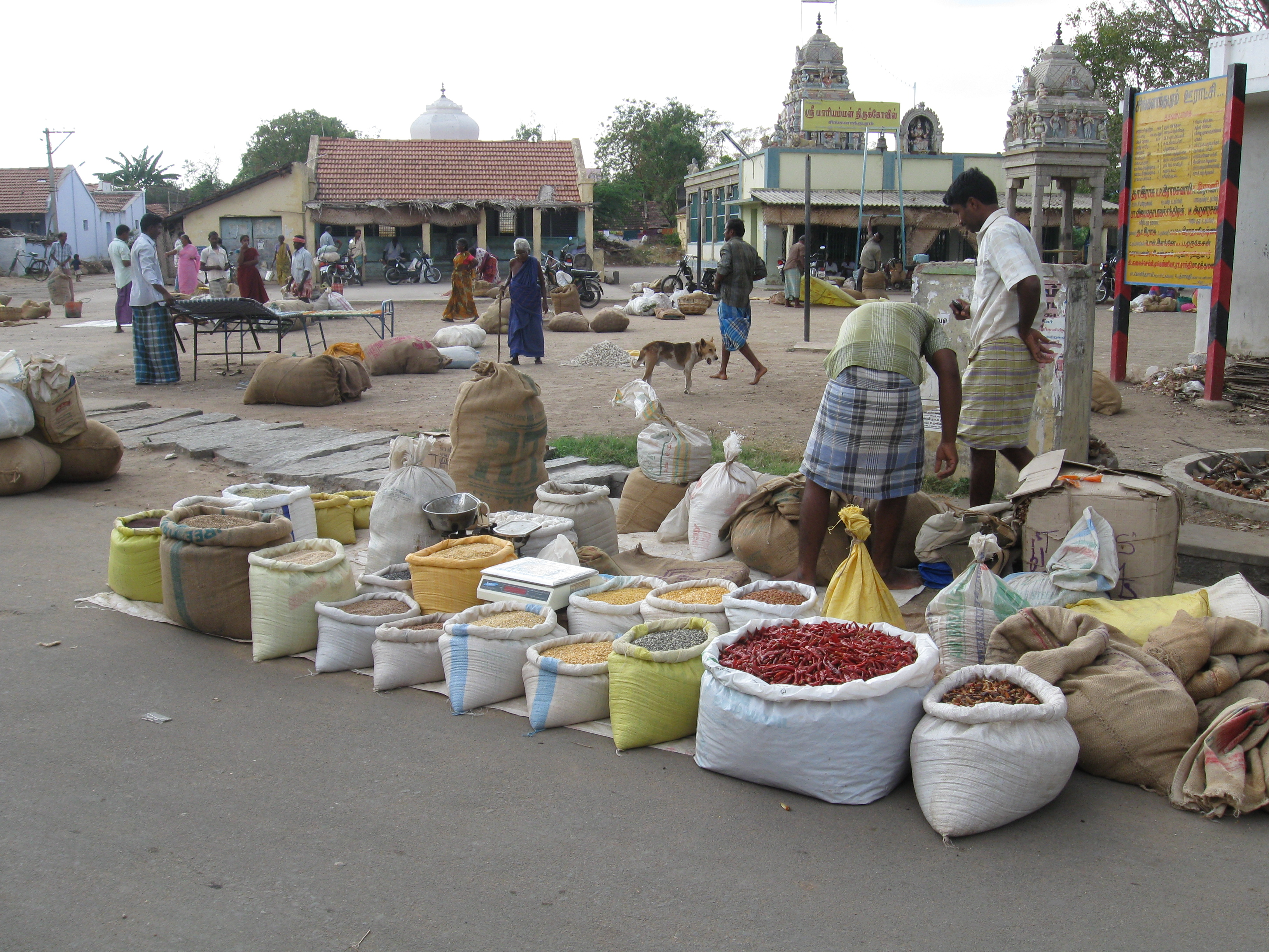 வாரச்சந்தையில் பல்பொருள் அங்கடி